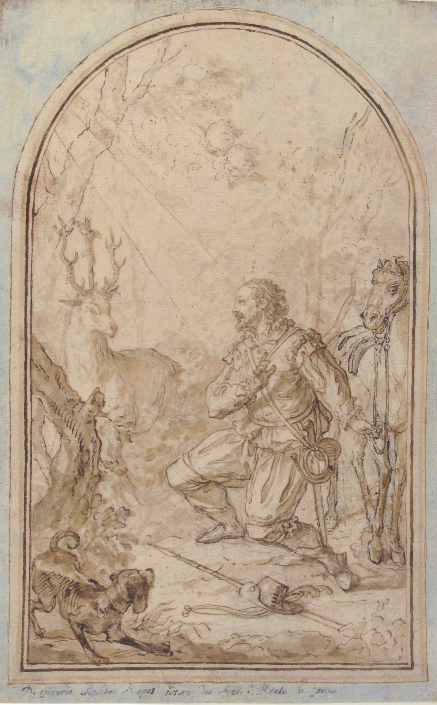 Drawing; Drawings